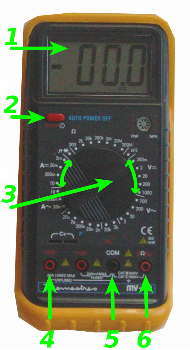 uso básico multímetro